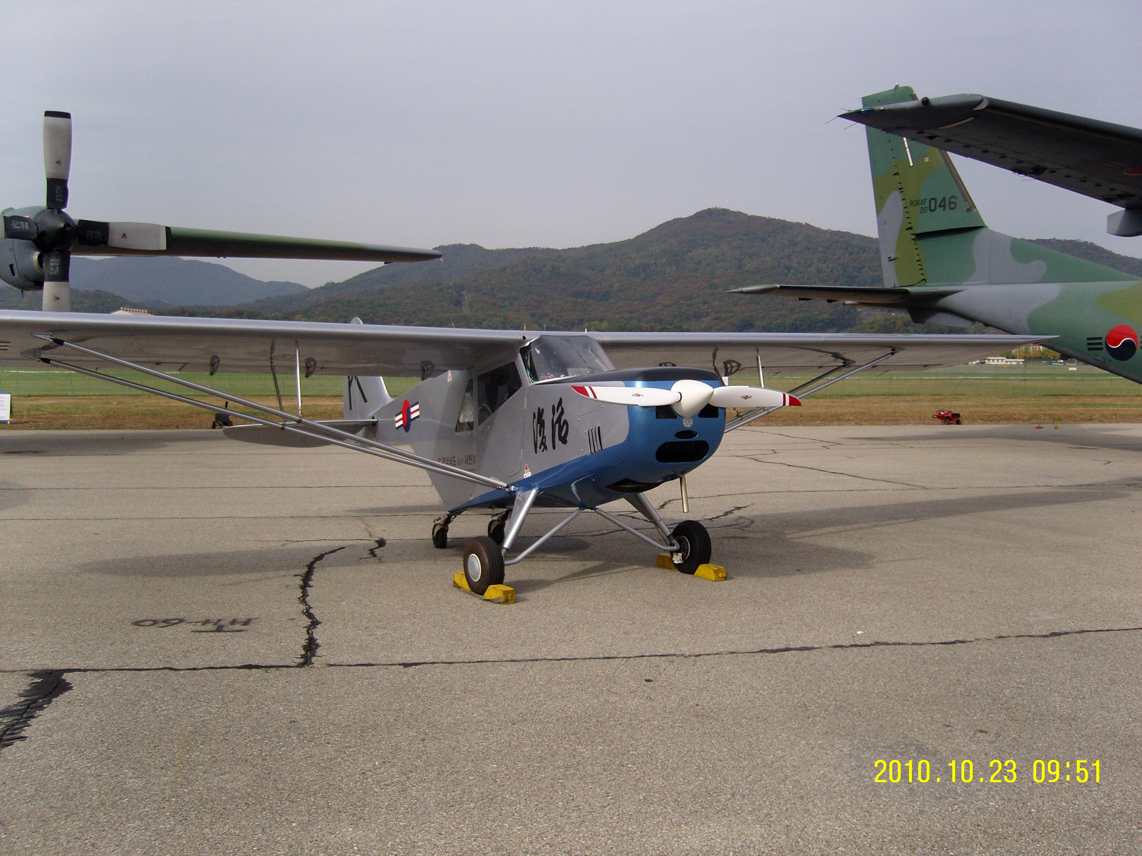 공군서울기지에서 열린 서울국제항공우주및 방위산업전시회(ADEX) 2011에서 전시된 개량복원 부활호